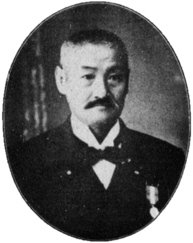 伊夫伎資弼（1851～1911）